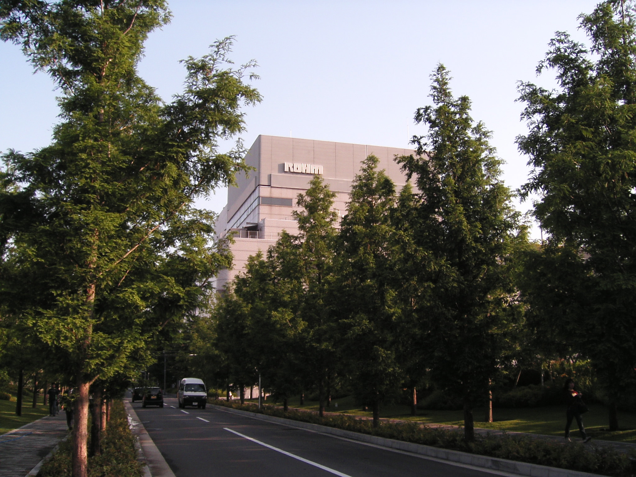 로움 본사